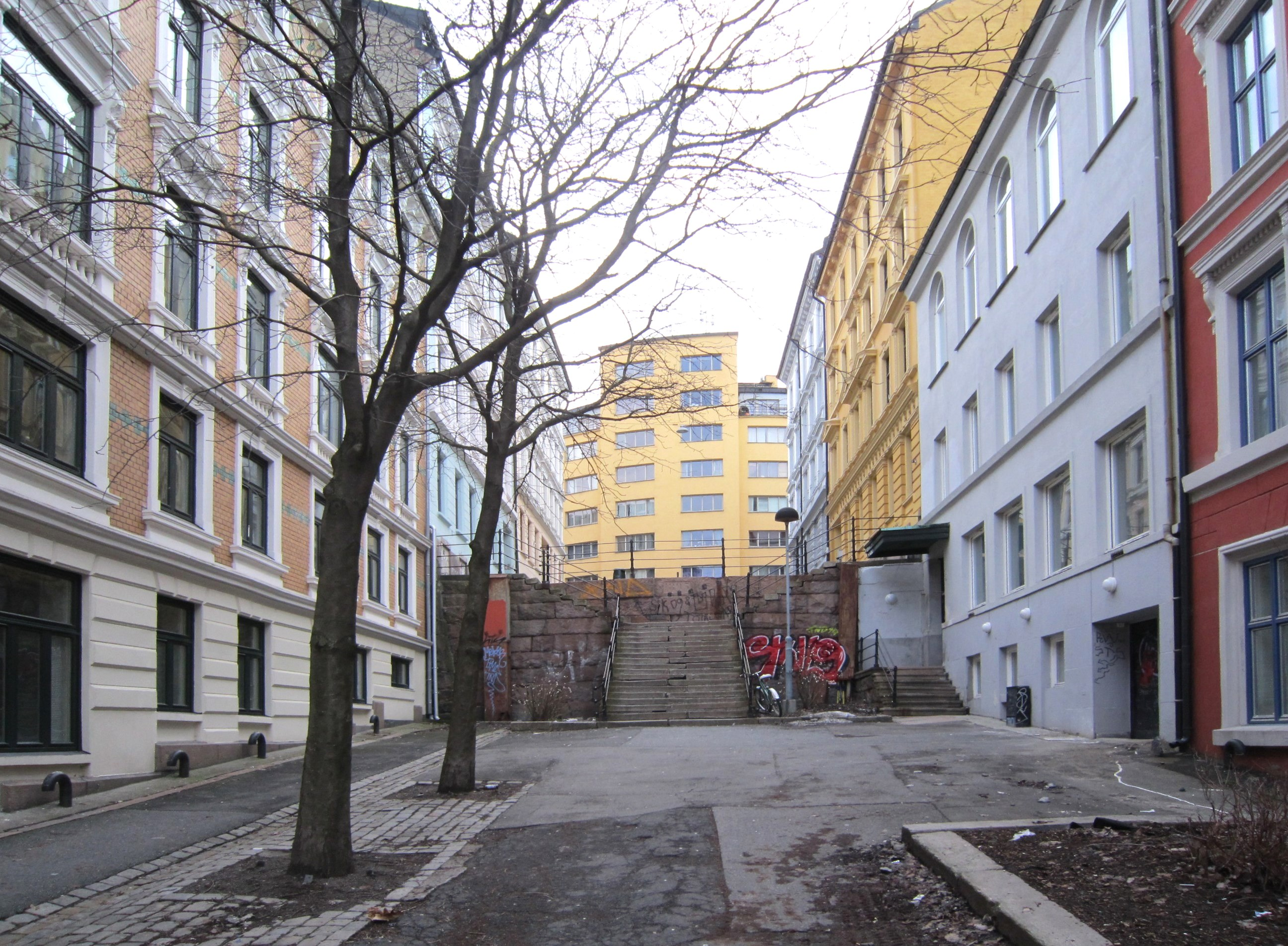 Wilses gate i Oslo